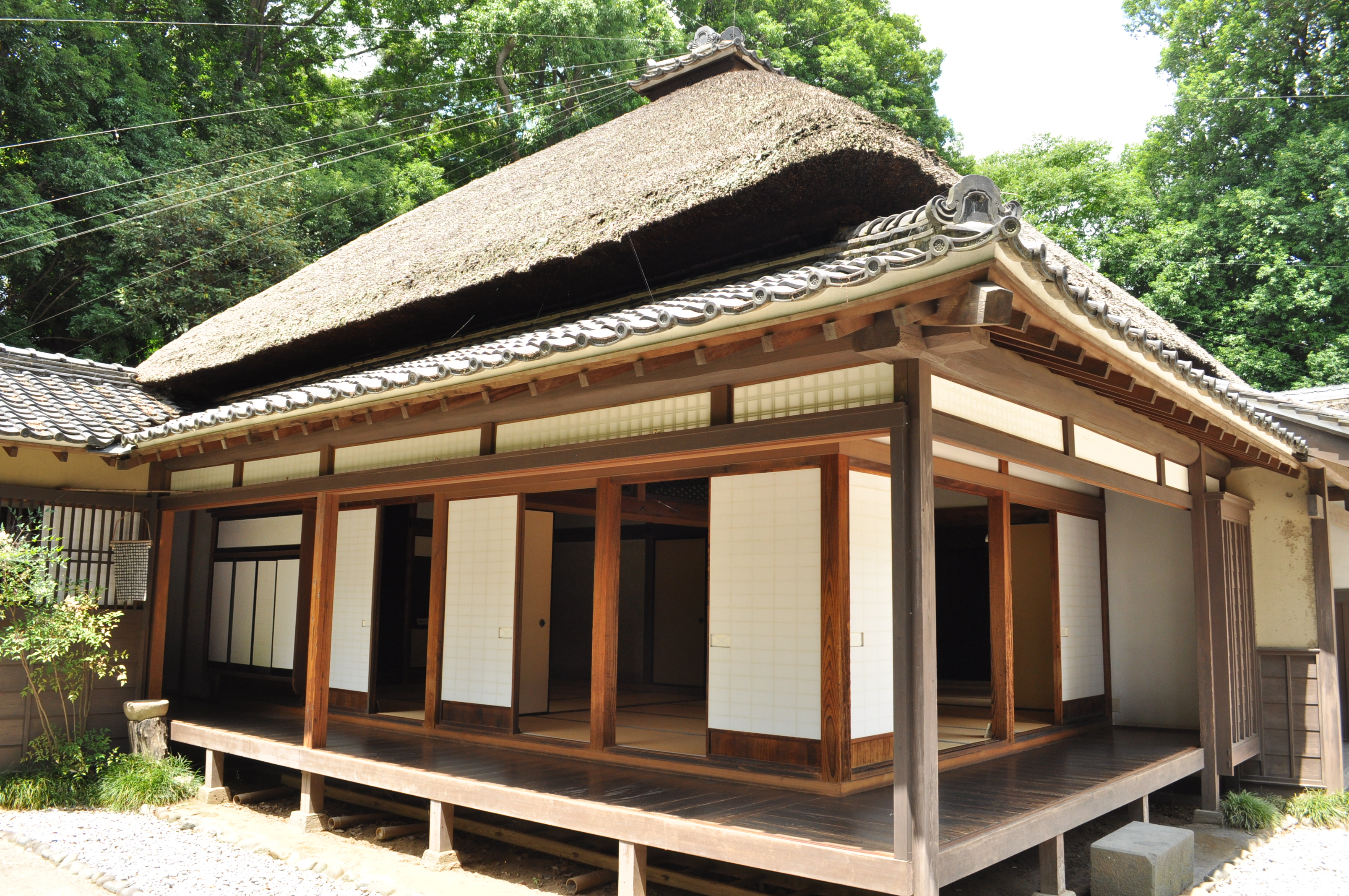 日本家屋 旧坂東家の縁側